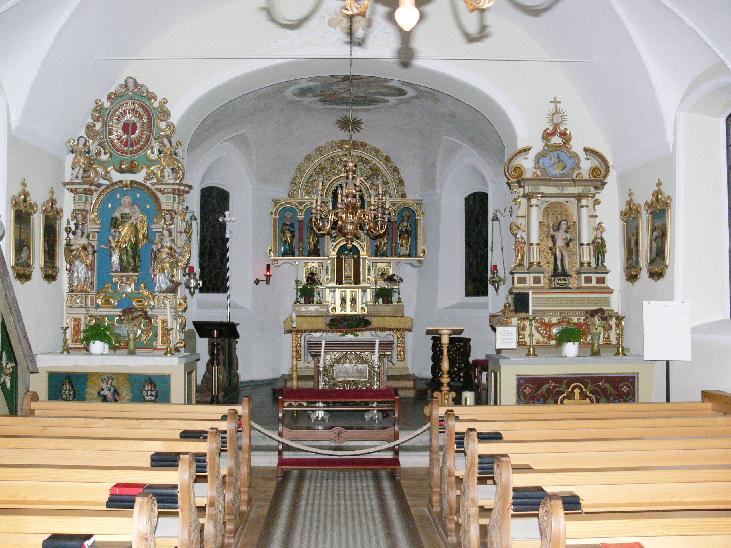 Gargellen, St. Gallenkirch, Vorarlberg, Österreich Kuratiekirche St. Maria Magdalena: Altäre Hochaltar von Moriz Schlachter, 1906 Moriz Schlachter (1852–1931) DescriptionGerman sculptorDate of birth/death18 March 185213 August 1931Location of birth/deathRavensburgRavensburgWork locationRavensburgAuthority control : Q1948196 VIAF: 80927094 GND: 136612679